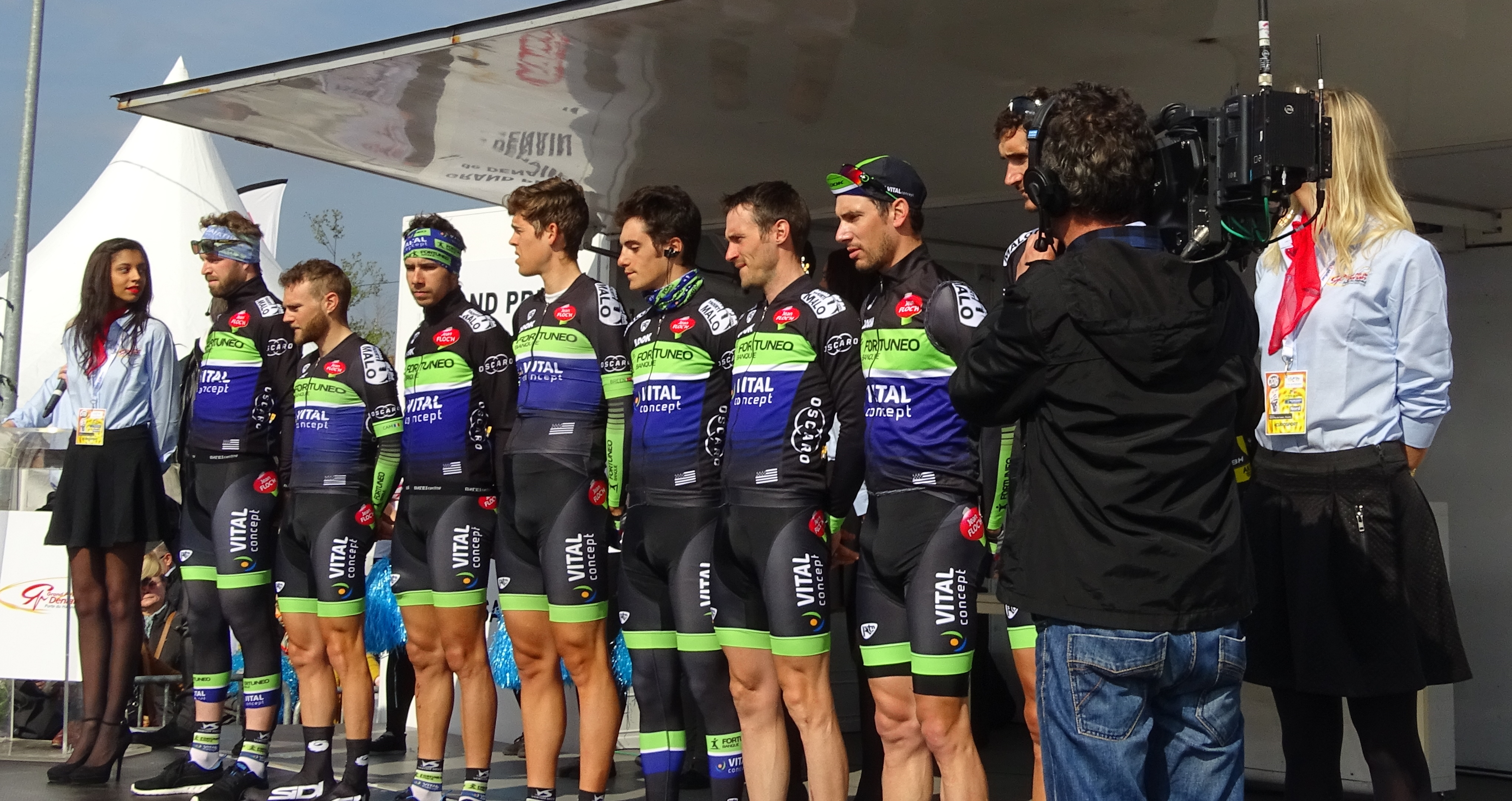 Reportage réalisé le jeudi 14 avril à l'occasion du départ et de l'arrivée du Grand Prix de Denain 2016 à Denain, Nord, Nord-Pas-de-Calais-Picardie, France.